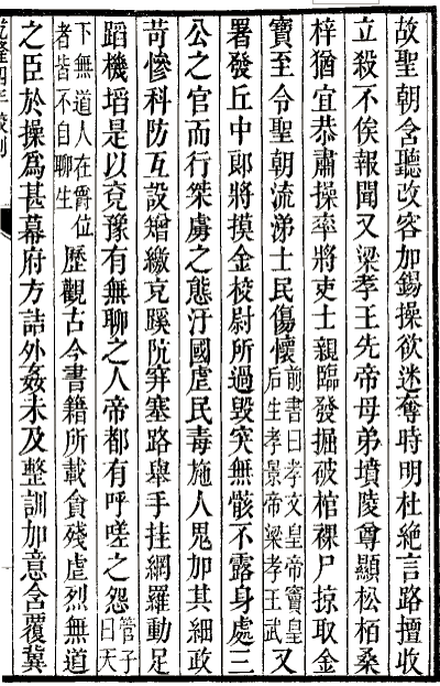 《武英殿二十四史·后汉书·袁绍刘表列传上》（卷104-40页）